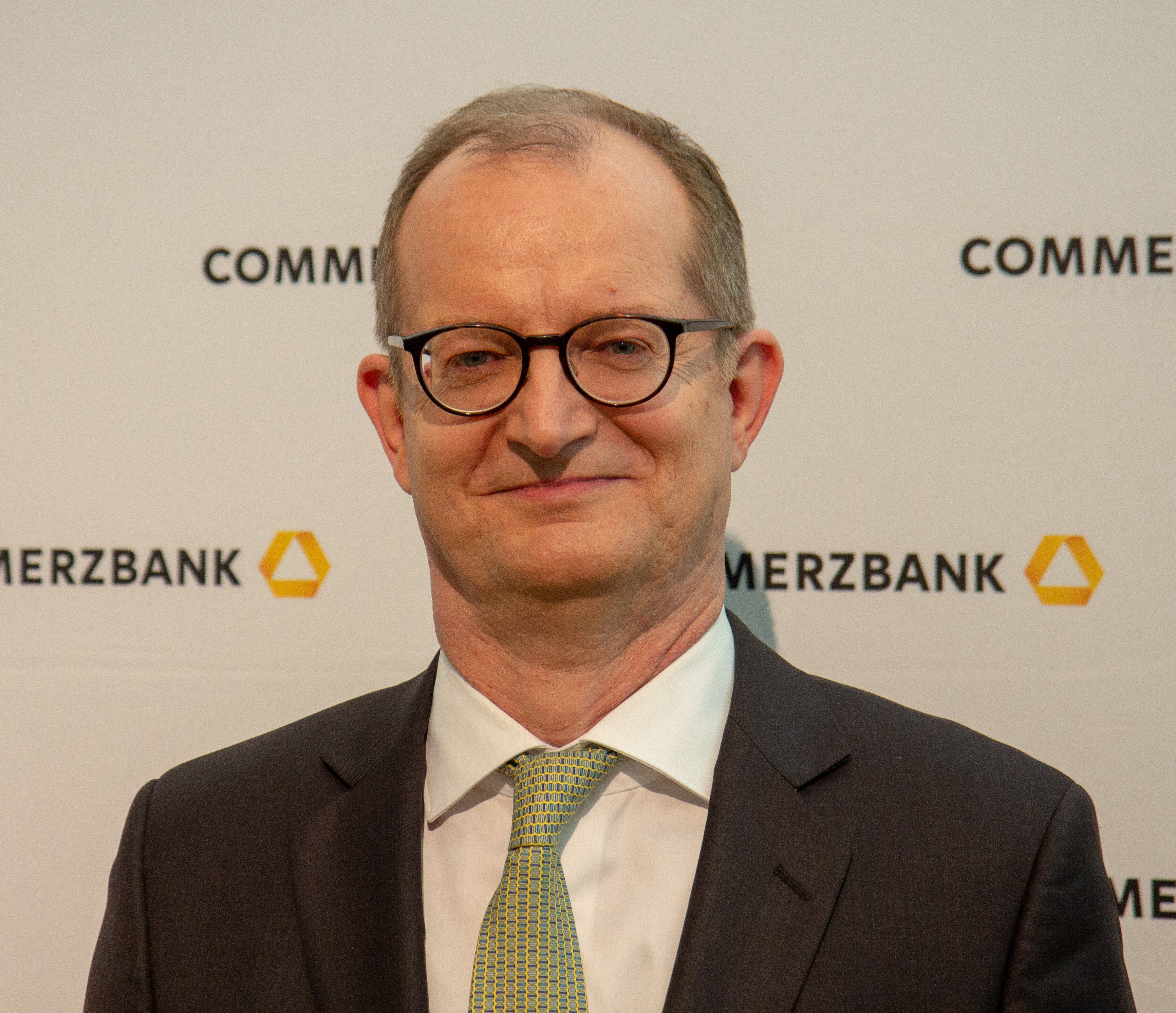 Bilanz Pressekonferenz der Commerzbank zum Geschäftsjahr 2018 am 14. Februar 2019 in Frankfurt.